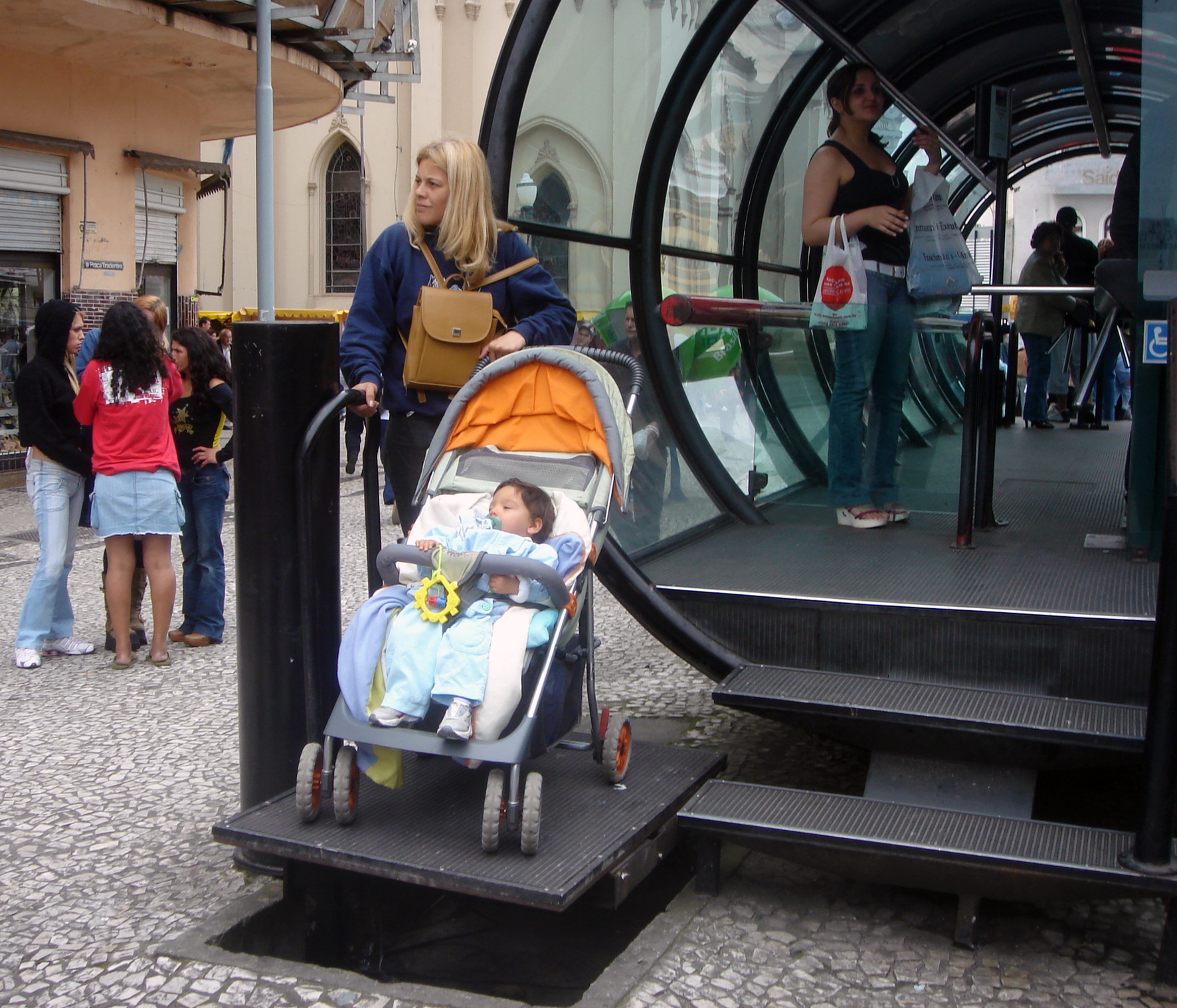 Sistema RIT de Curitiba, Brazil